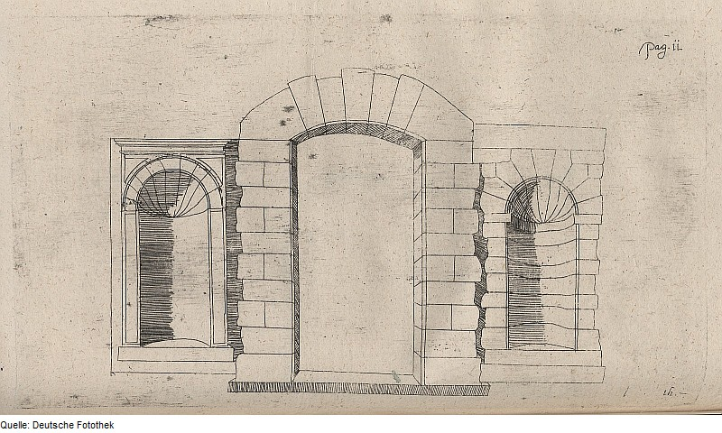 Original image description from the Deutsche Fotothek Architektur & toskanische Ordnung & Tor & Bogen